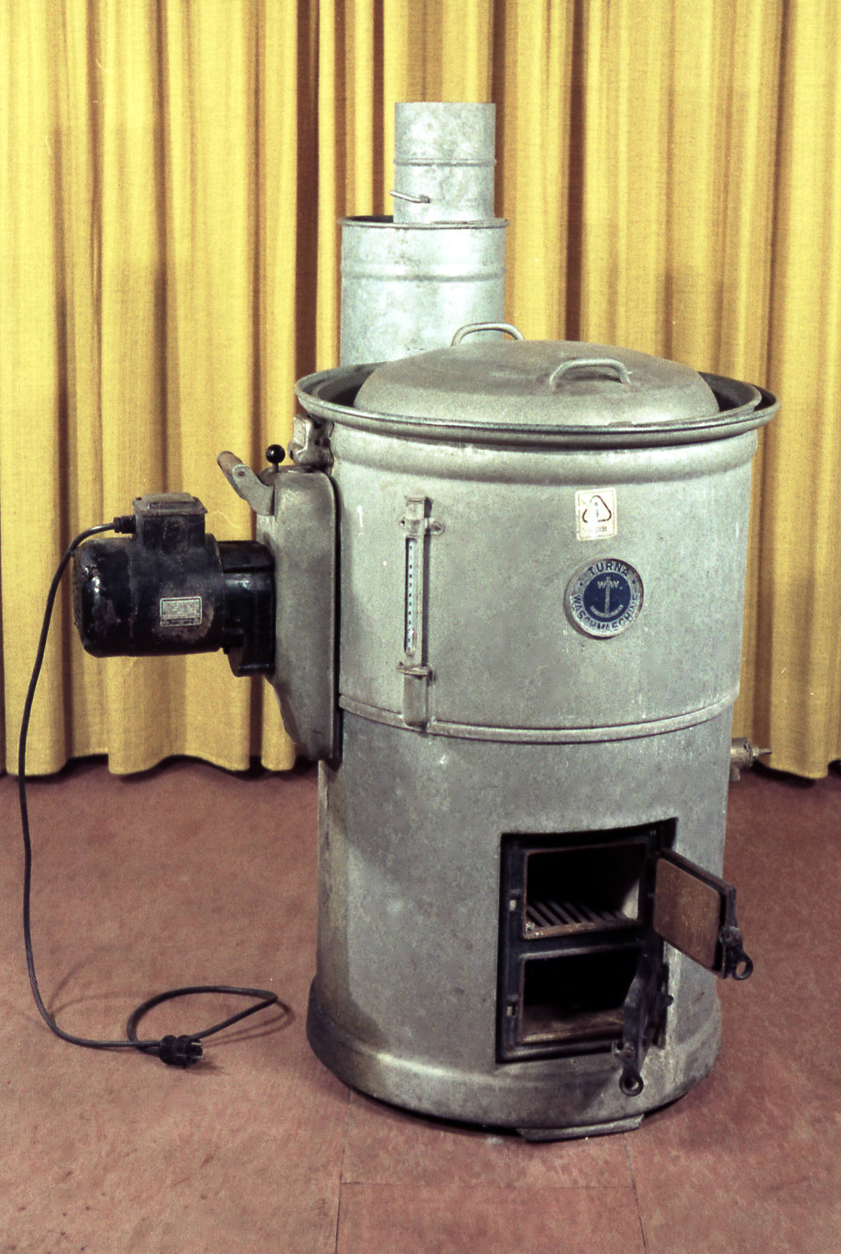 Frontansicht der Waschmaschine Turna (Hersteller: VEB Waschgerätewerk Schwarzenberg)